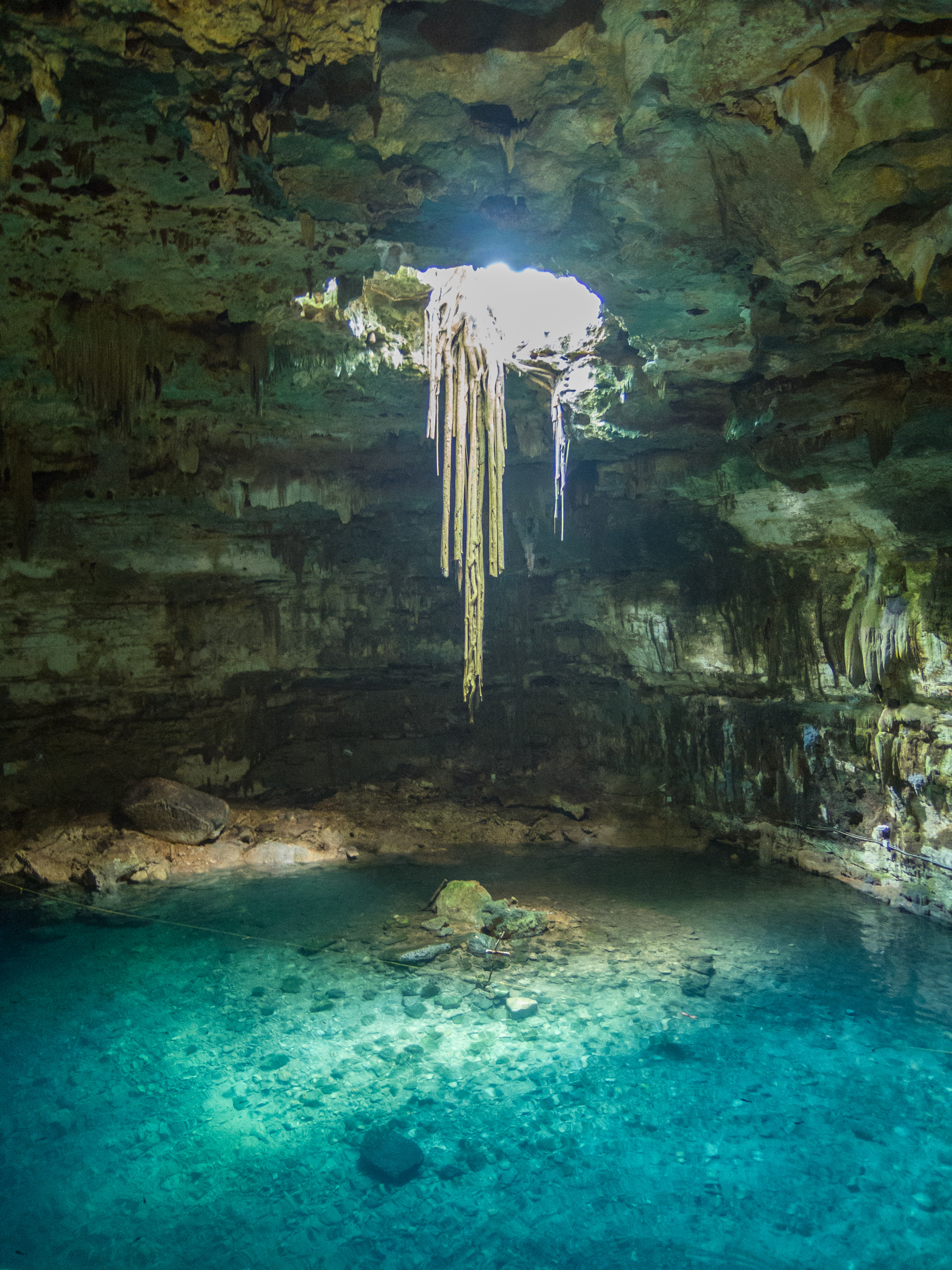 cenote in valladolid mexico